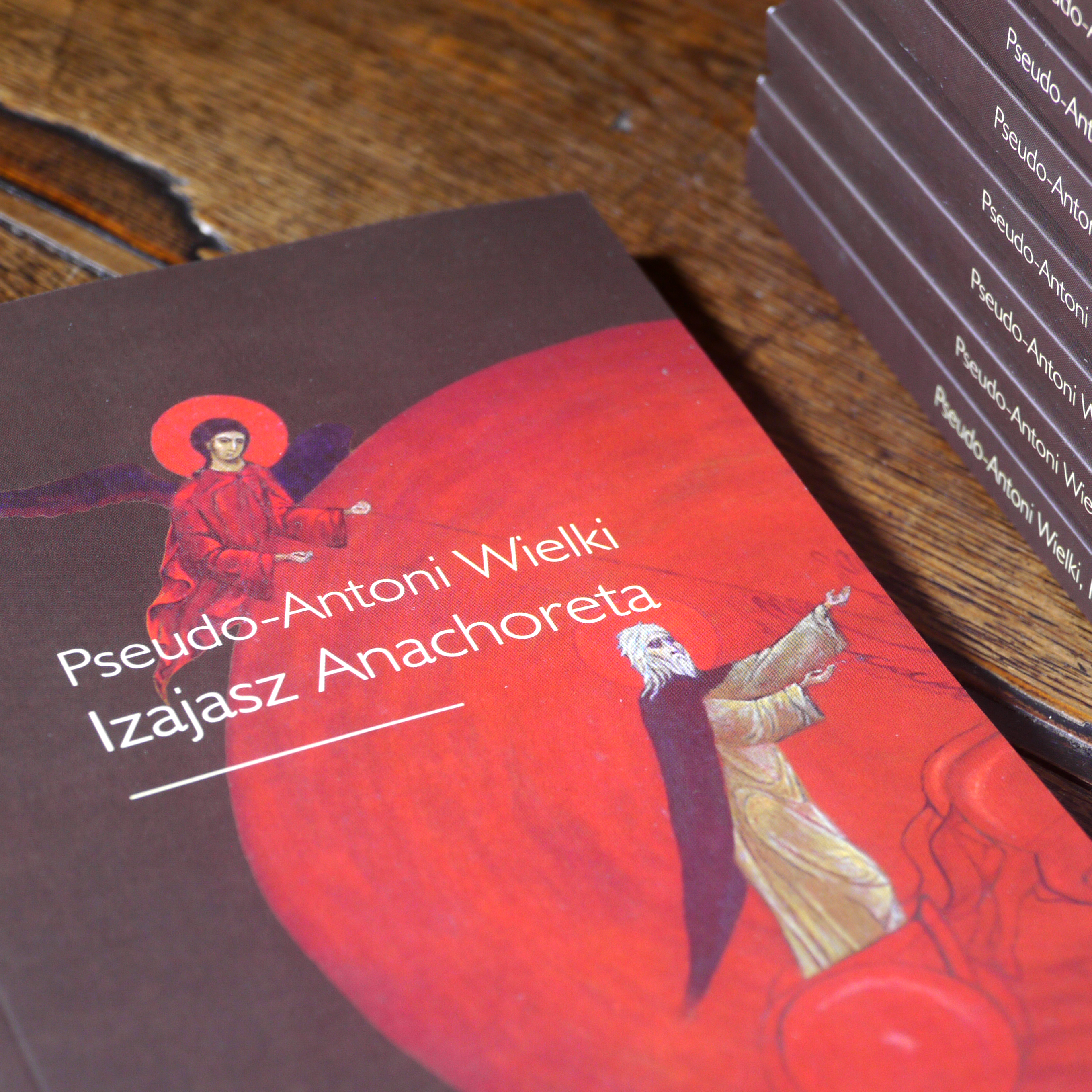 Okładka wyboru z I tomu "Filokalii".